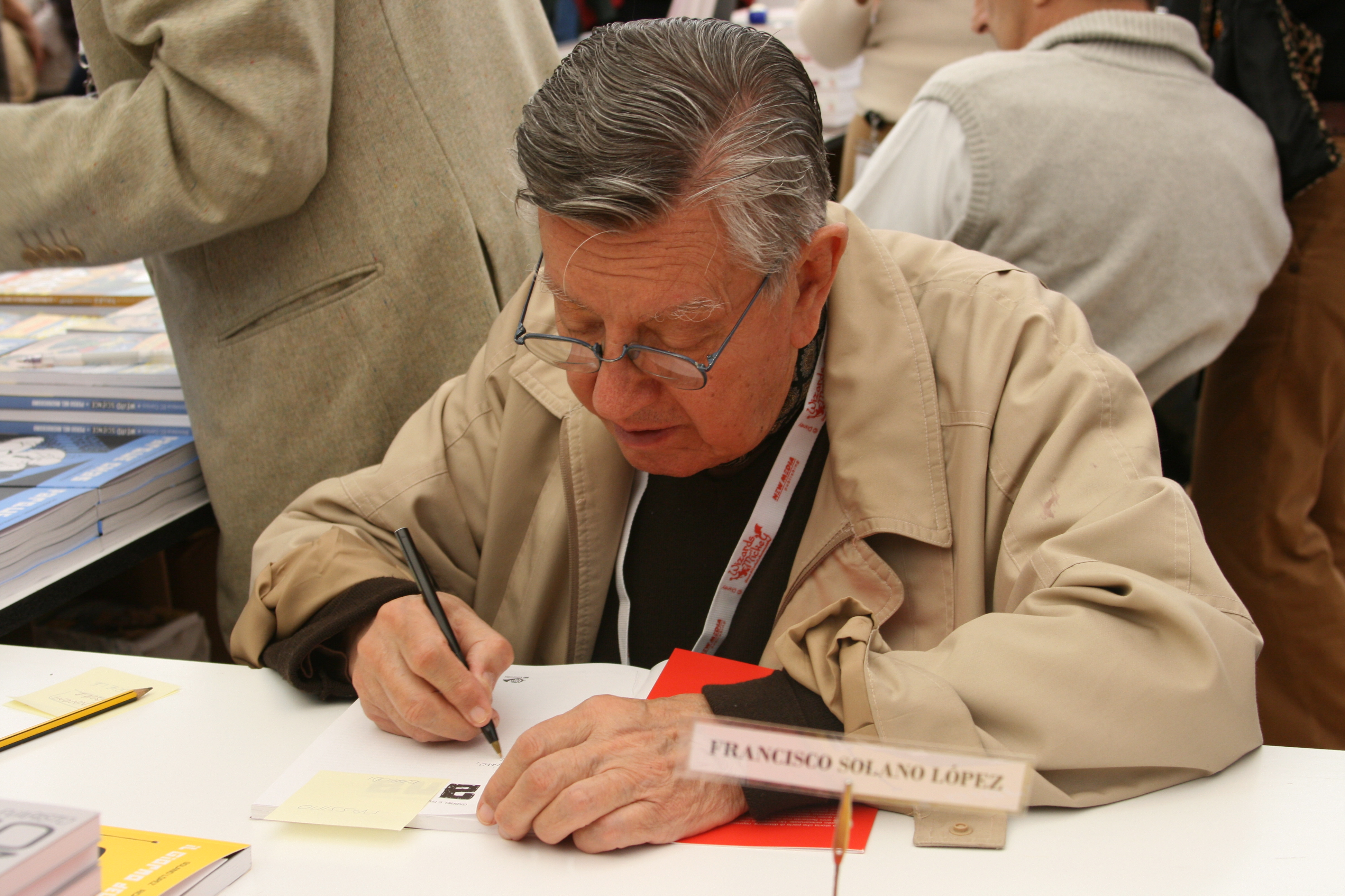 Francisco Solano Lopez, l'autore dell'Eternauta